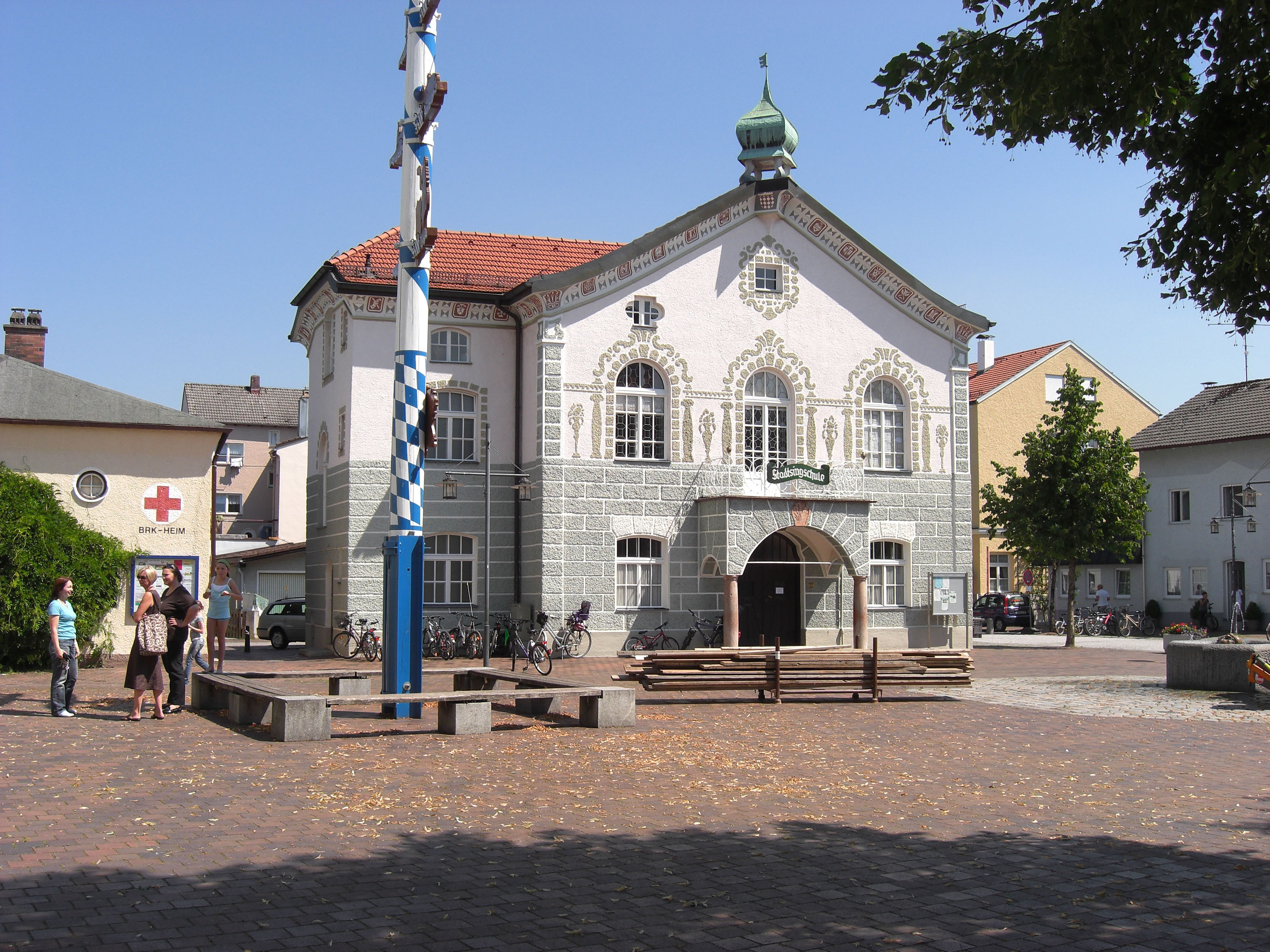 Die Kolbermoorer Stadtsingschule im alten Rathaus am Alten Rathaus Platz in der Stadtmitte von Kolbermoor.